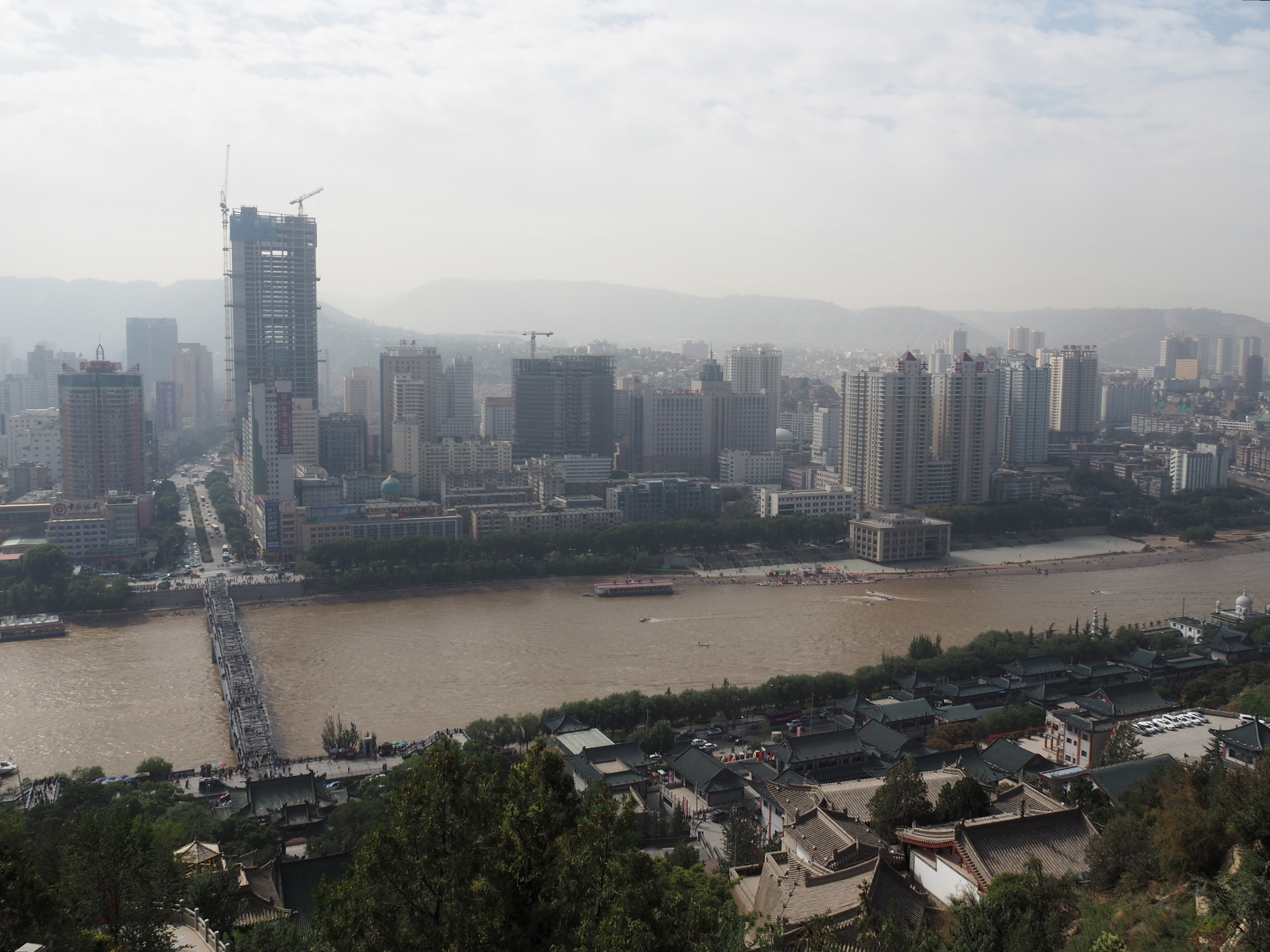 Lanzhou